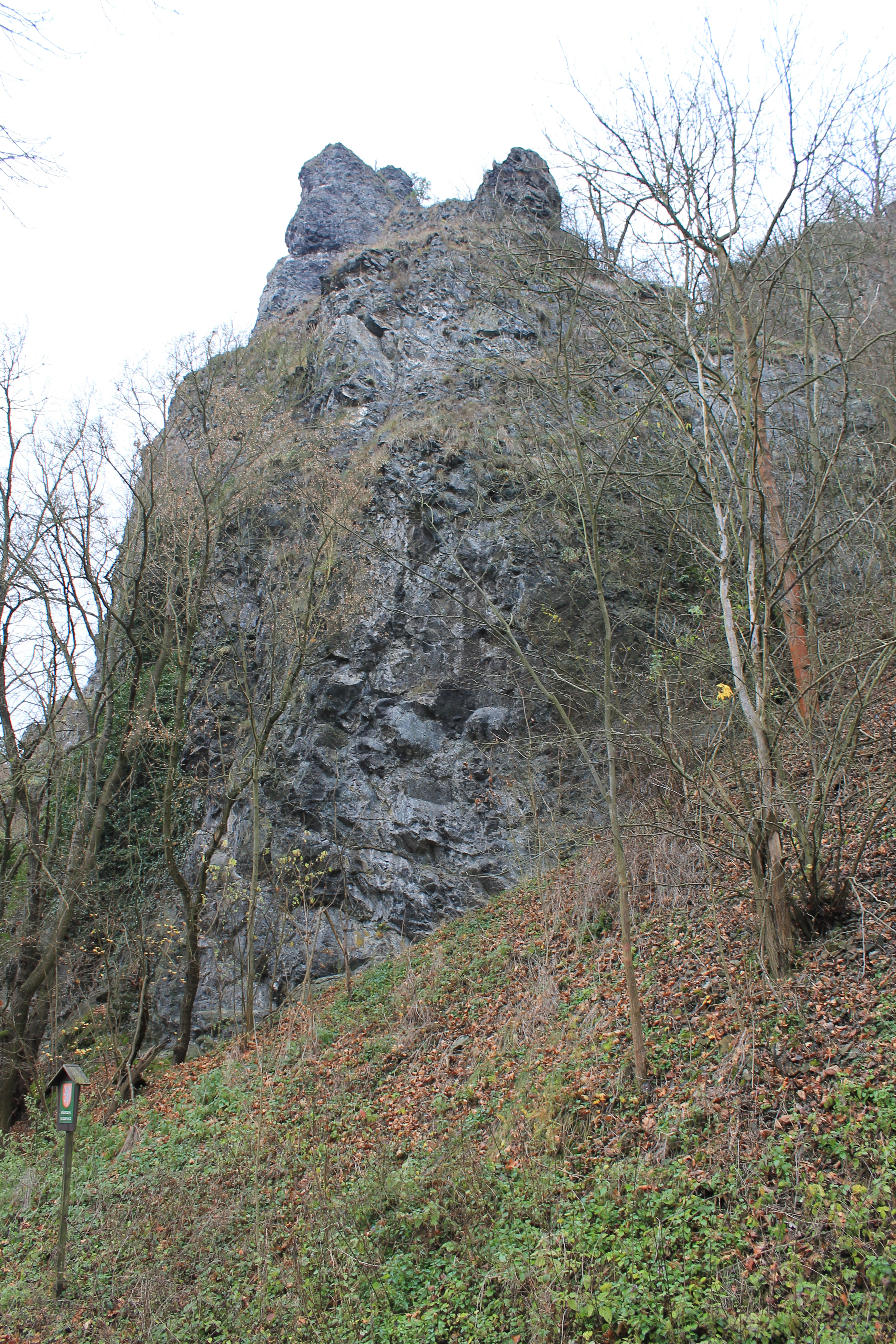 Čertova skála z pohledu od řeky Berounky...